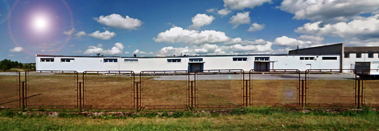 Tootmishoone